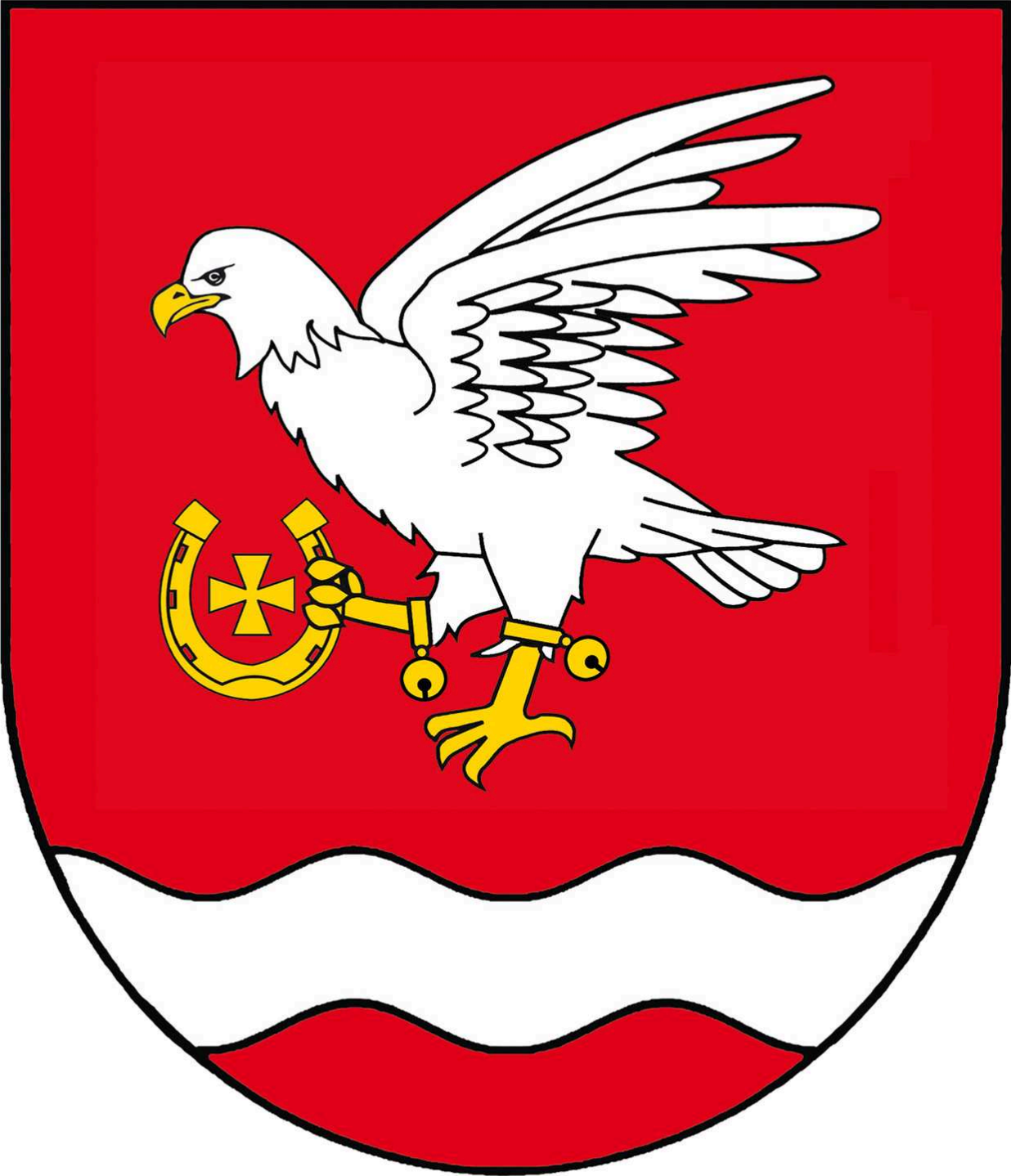 Herb gminy Dołhobyczów